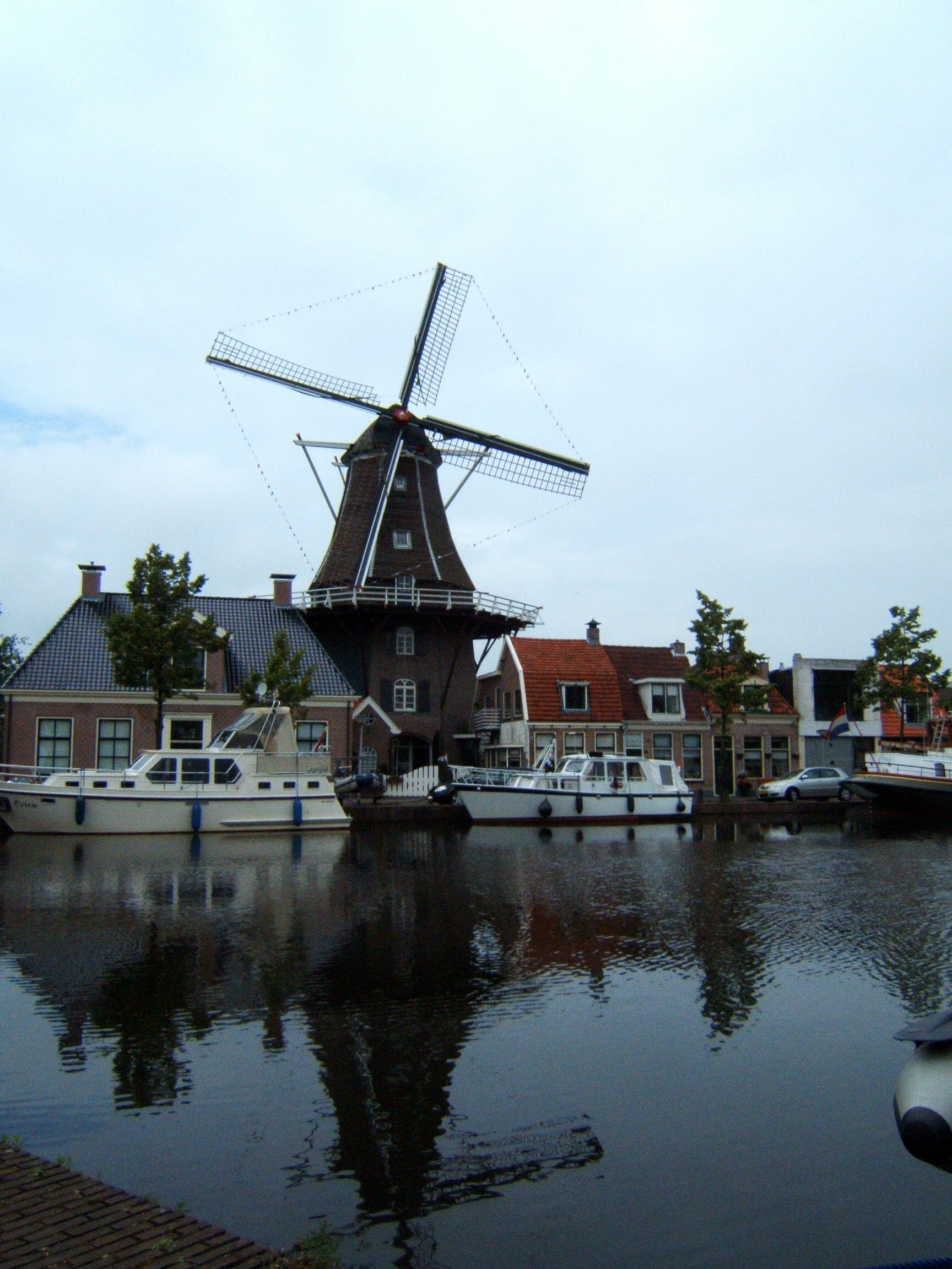 De molen De Vlijt staat aan de Sluisgracht in Meppel en is sinds 2002 herbouwd op een onderbouw uit 1859 en heeft een vlucht van 21,80 meter. Het is een achtkantige houten stellingmolen op een stenen onderbouw, met de functie van korenmolen.